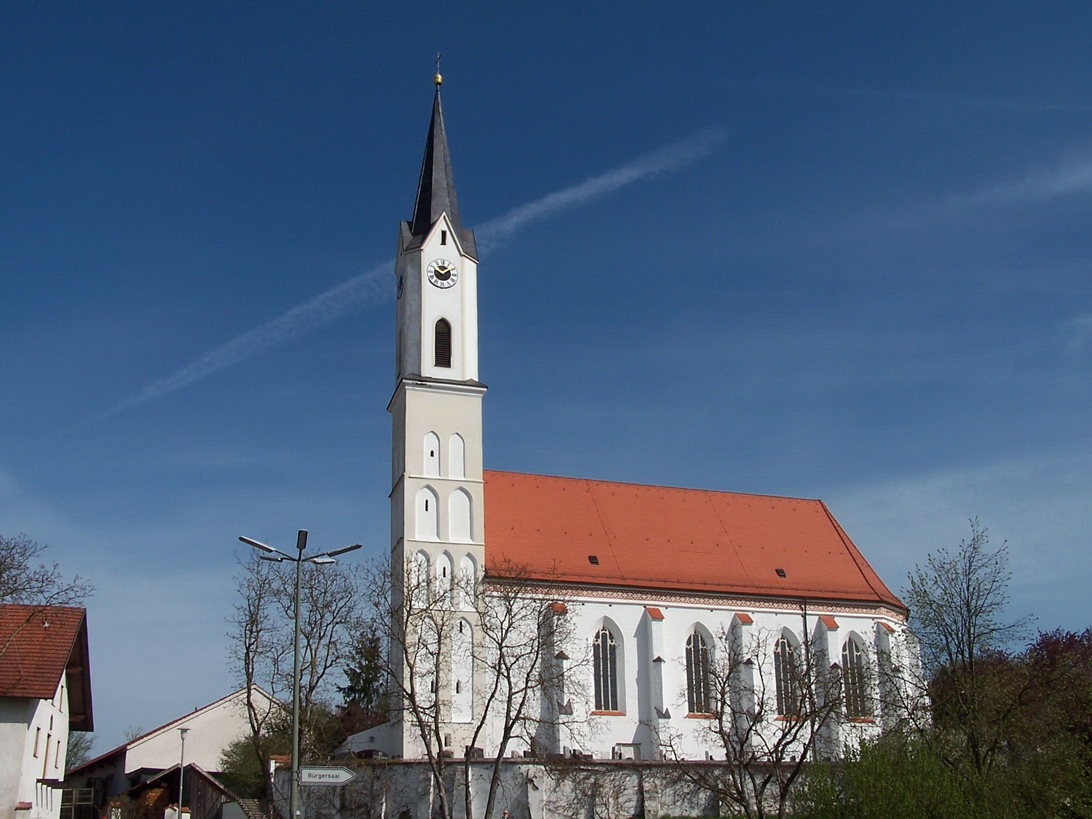 Ergolding, Lindenstraße 94. Kath. Kirche St. Peter und Paul, spätgotische Anlage, um 1500, Turm älter; mit Ausstattung; altes Leichenhaus, spätgotisch.